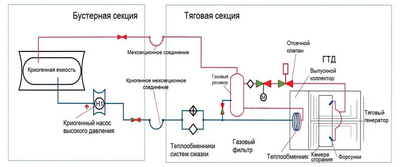 Новая топливная система газотурбовоза ГТ1-001